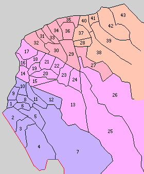 富山県下新川郡の町村。